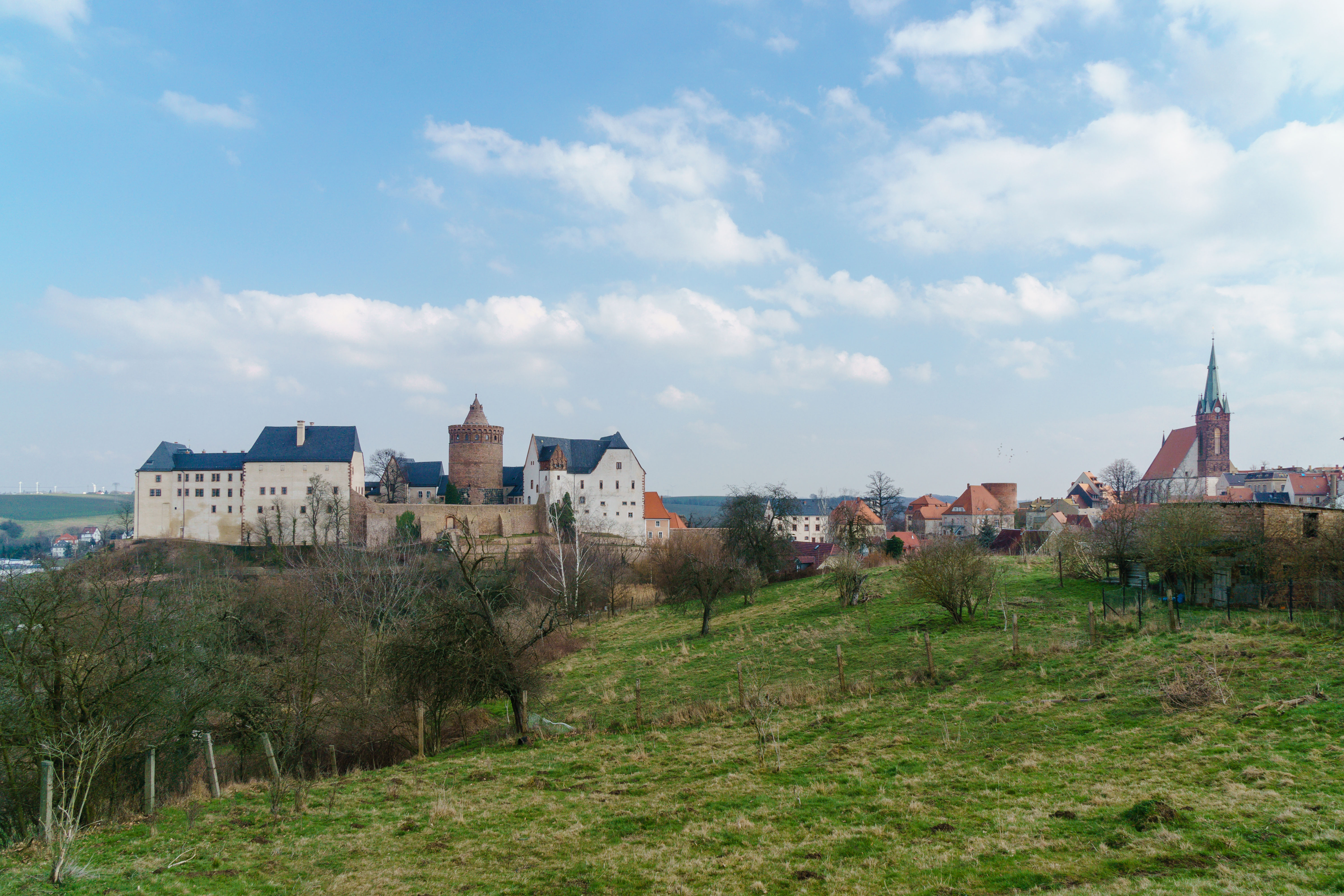 Blick vom Kesselberg auf Burg Mildenstein in Leisnig